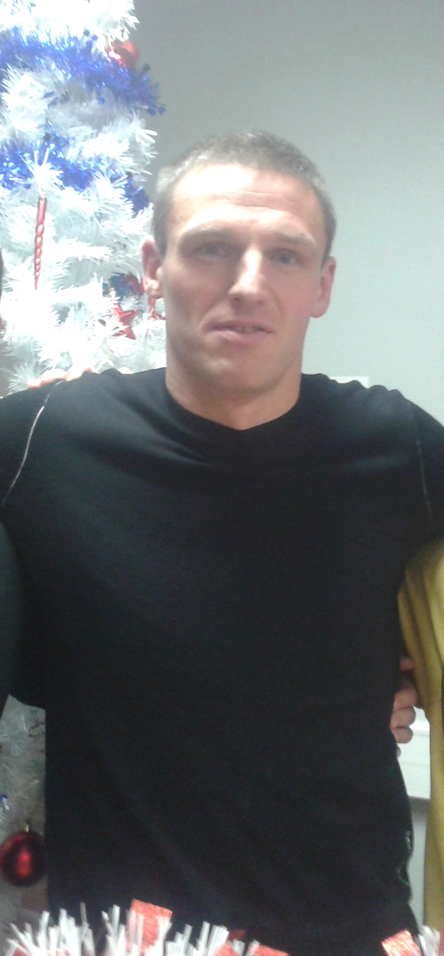 Le joueur professionnel et arbitre Laurent Quievreux, lors de son passage dans l'émission "En Pleine Lucarne" de la radio RBM 99.6 FM.